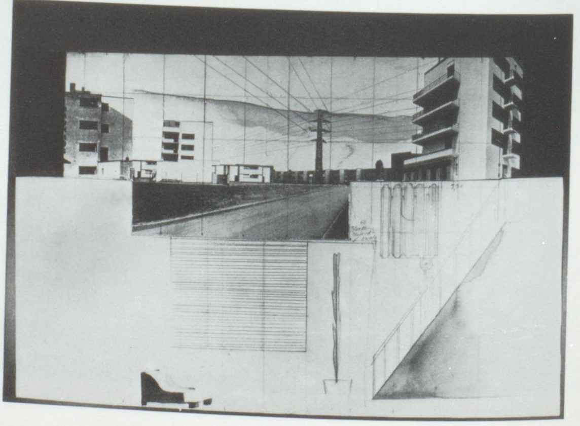 Traugott Müller Paul Hindemith Neues vom Tage Entwurf2 1929